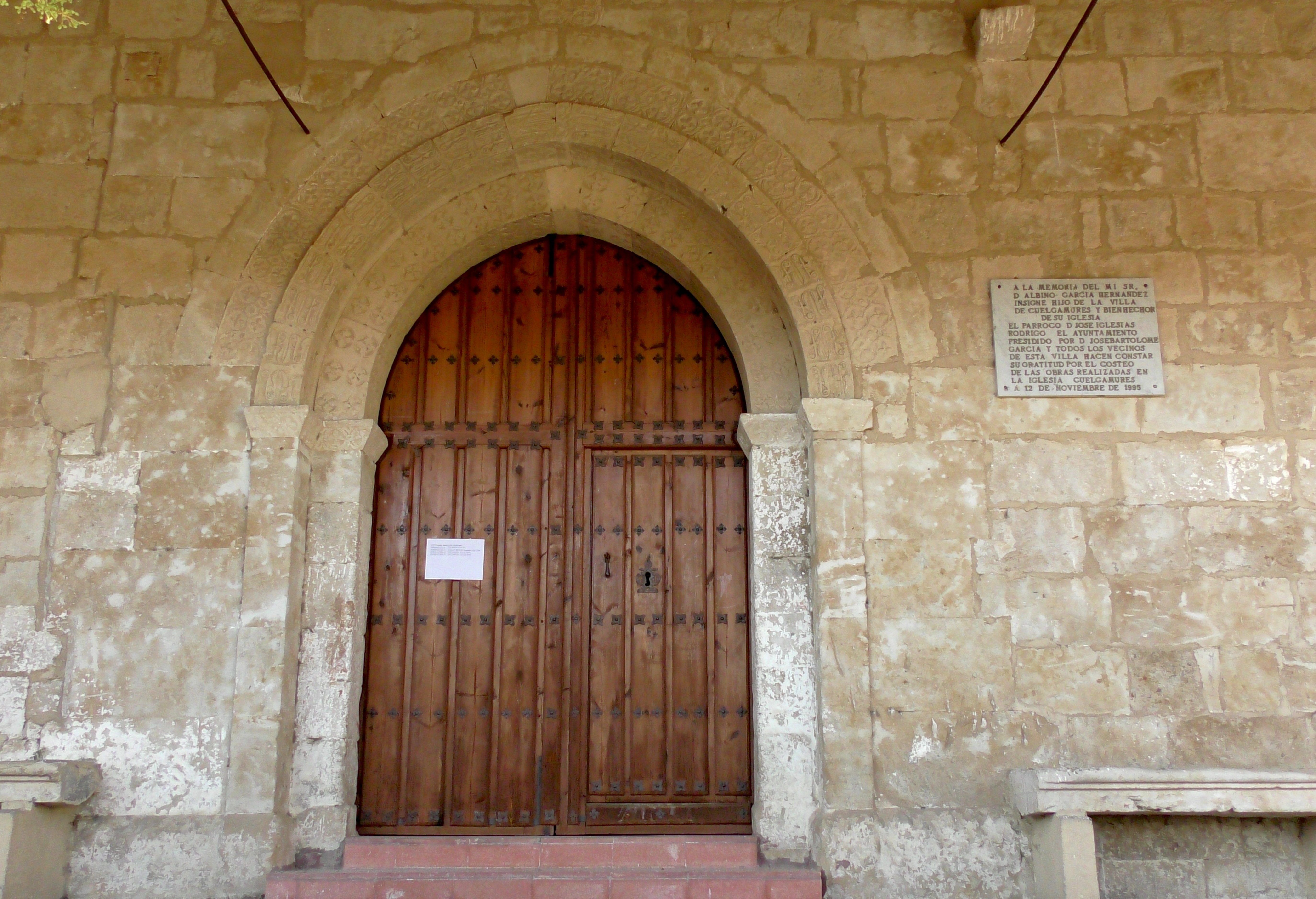 Cuelgamures